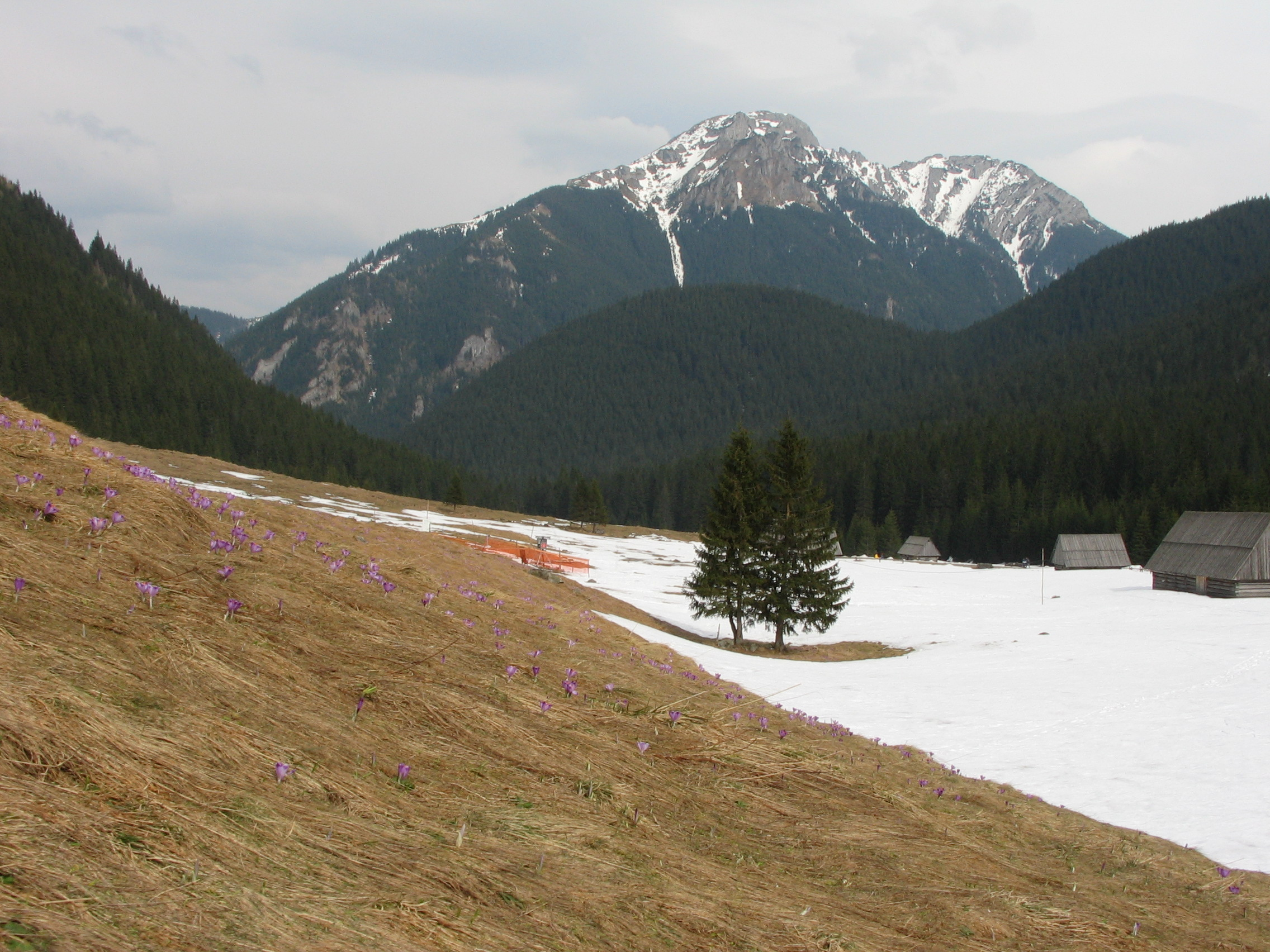 Dolina Chochołowska - widok na Kominiarki Wierch